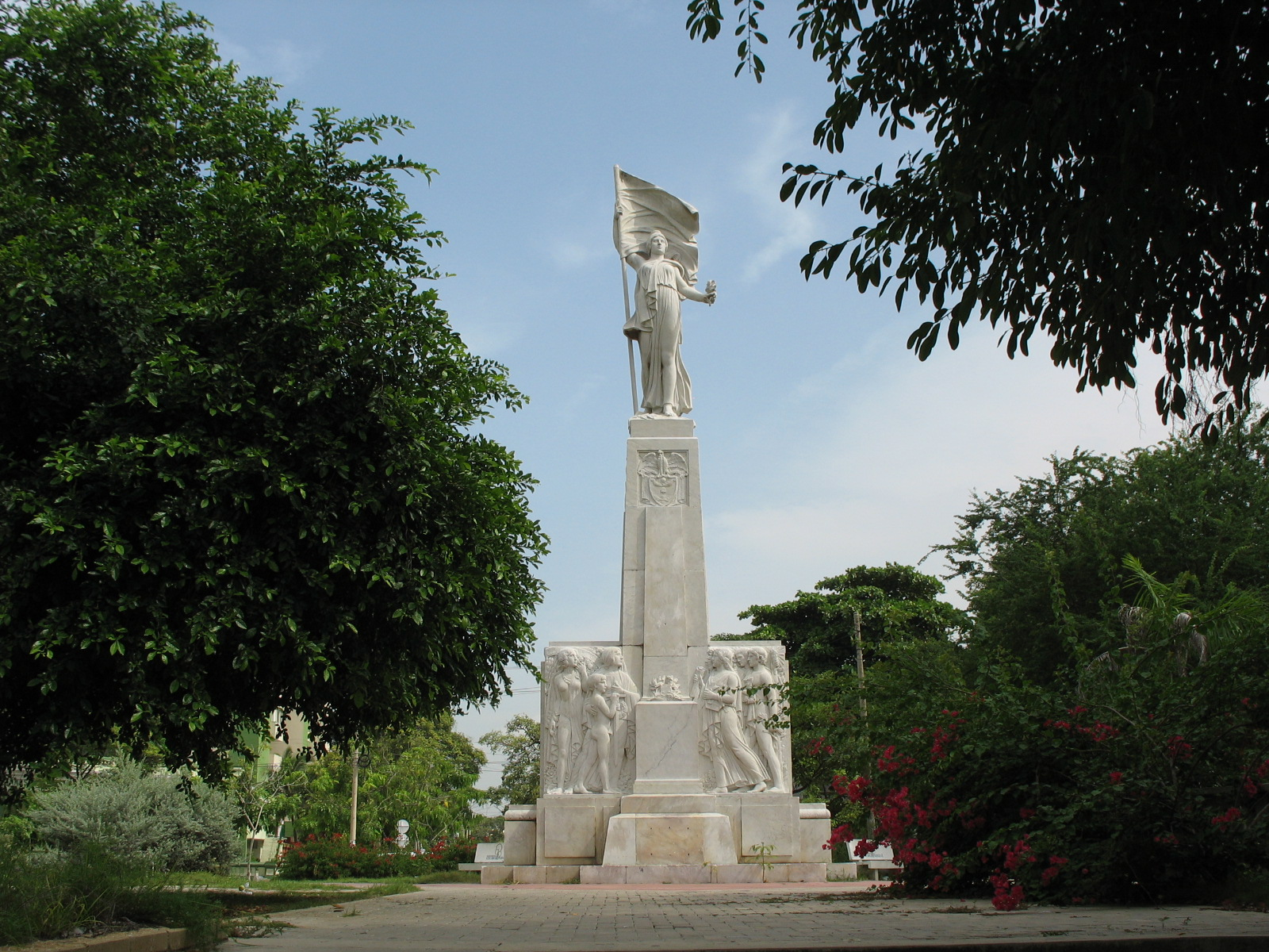 Monumento a la Bandera, Barranquilla